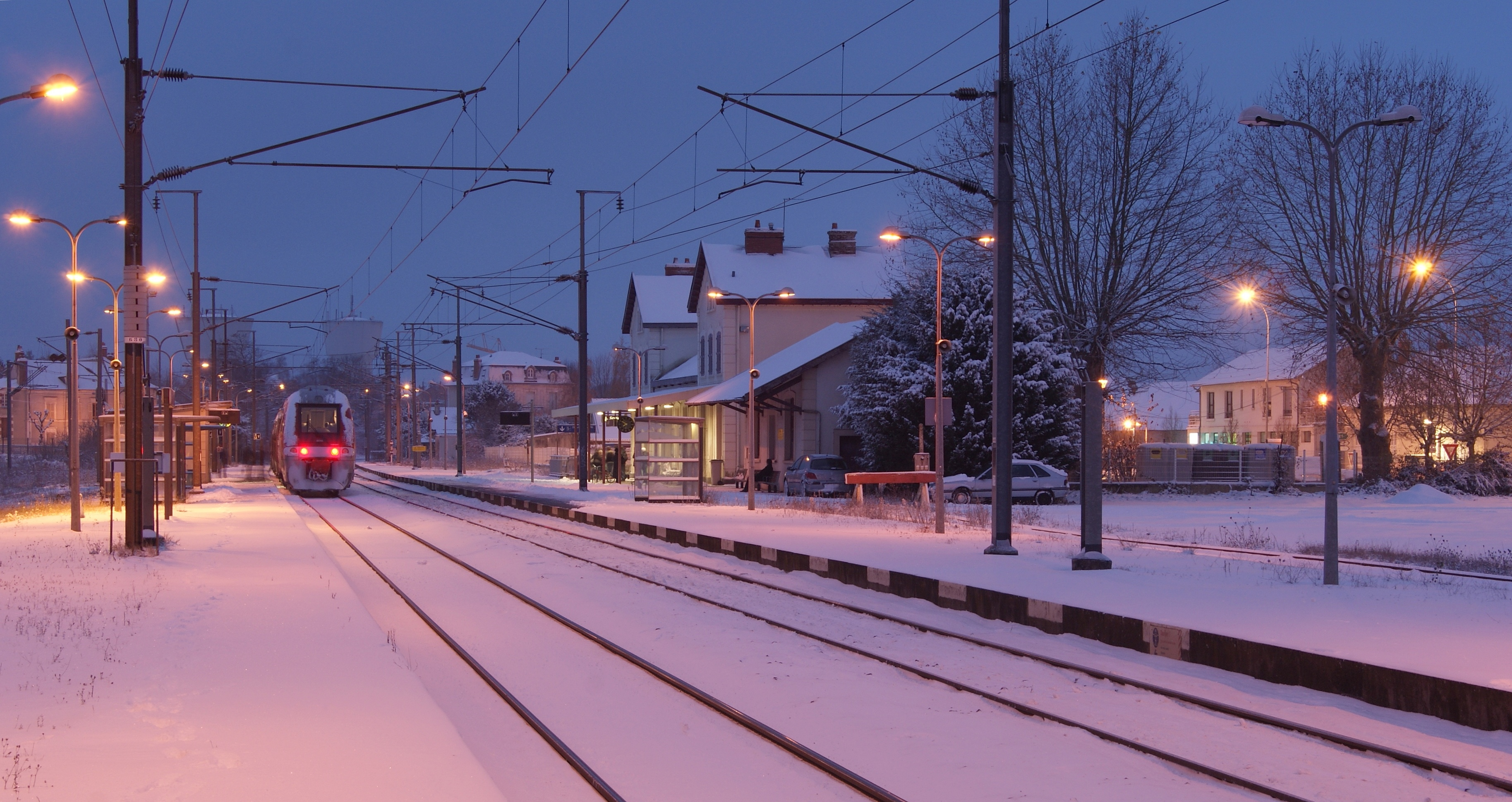 La gare de la Charité sur Loire un matin de neige.